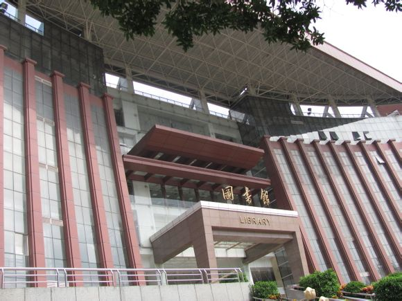 暨南大學校本部圖書館